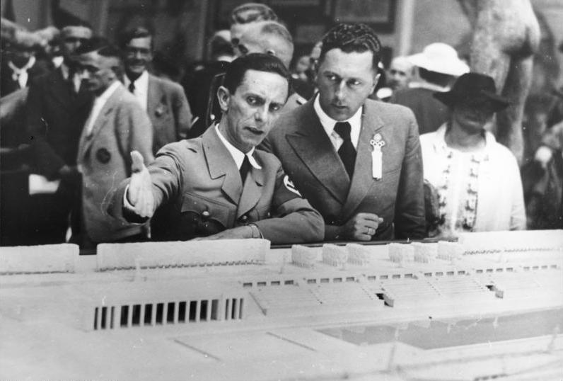 Berlin, Olympische Kunstausstellung, Eröffnung ADN-ZB-Archiv Berlin, Juli 1936: Nach der Eröffnung der Olympischen Kunstausstellung am Kaiserdamm sehen wir Joseph Goebbels und Hans Schweitzer-Mjölnir bei einem Rundgang durch die Ausstellung. [Scherl Bilderdienst] Abgebildete Personen: Goebbels, Joseph: Reichsminister für Volksaufklärung und Propaganda, Gauleiter Berlin, Deutschland Schweitzer-Mjölnir, Hans Prof.: Reichsbeauftragter für künstlerische Formgebung, Deutschland